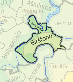 Padaryta iš lt::File:LietuvosSeniunijos.png